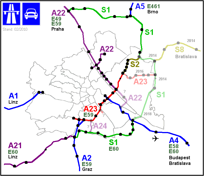 Autobahnen und Schnellstraßen in Wien und Umgebung